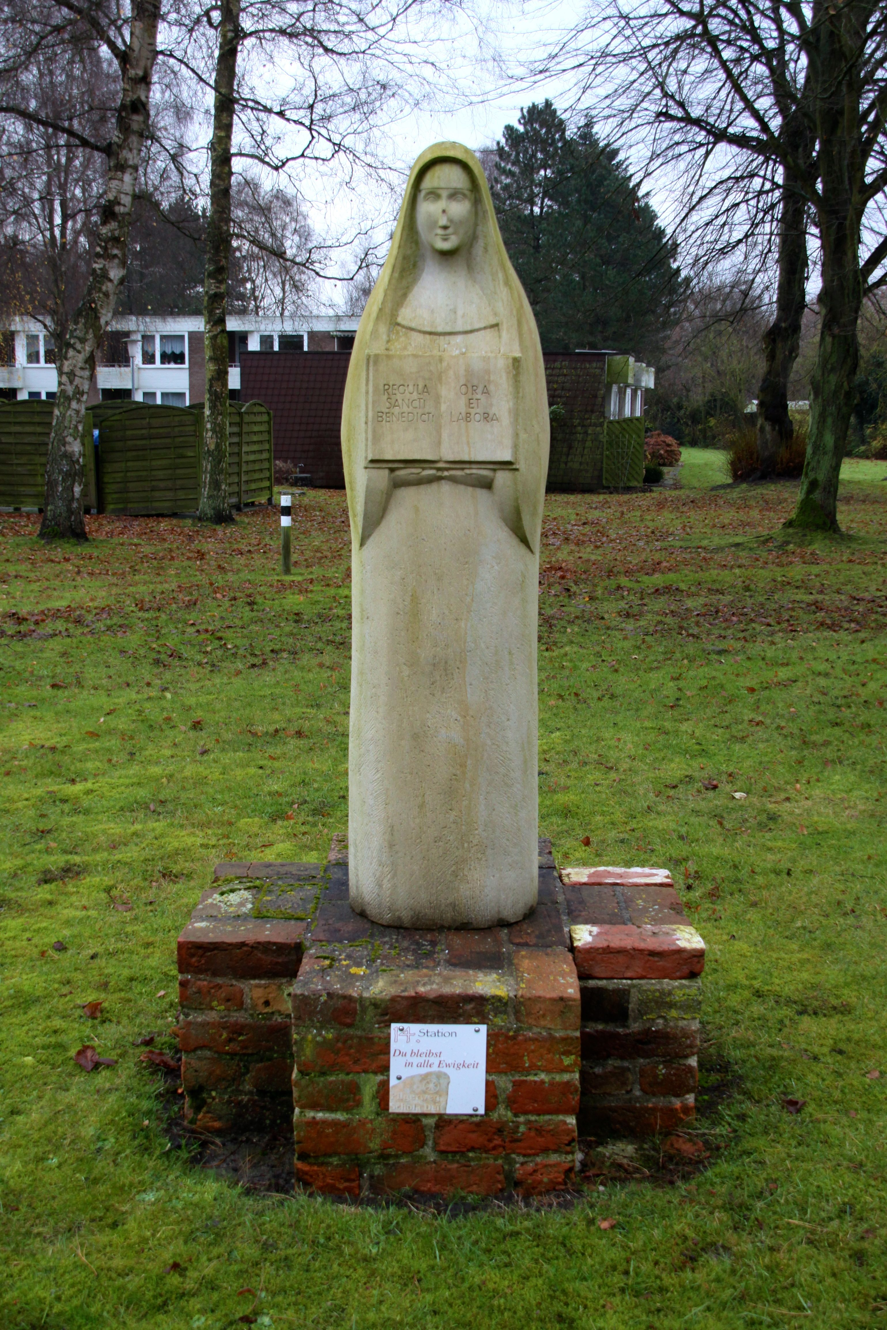 Marienstatue auf dem Gelände des ehemaligen Klosters Marienthal in Norden.